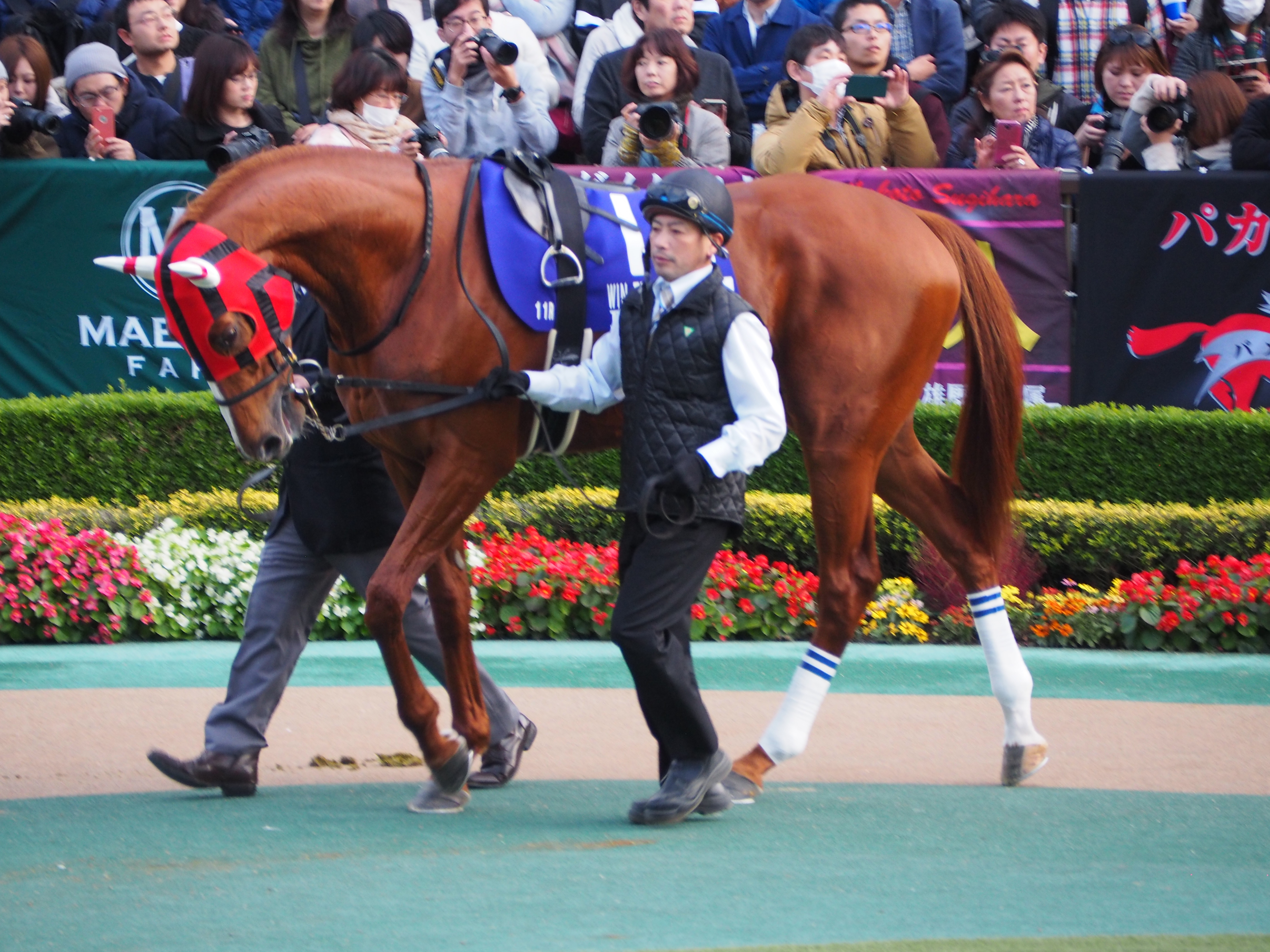 ウインテンダネス ジャパンカップ パドック